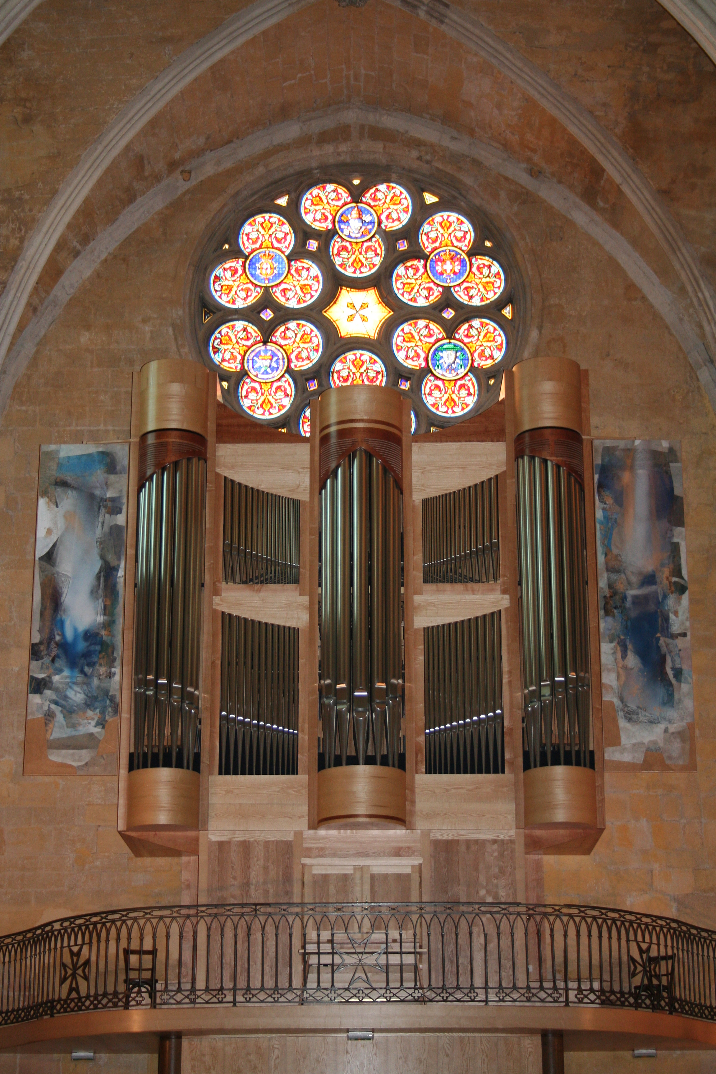 Église Saint-Jean-de-Malte, Aix-en-Provence (France).